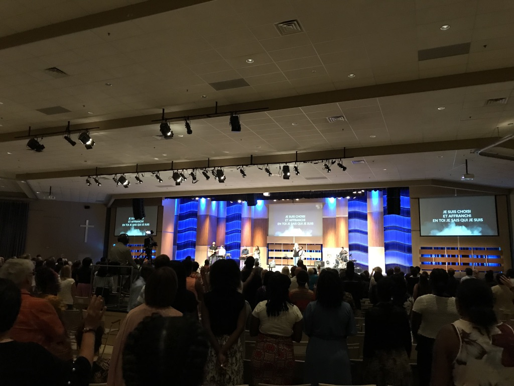 Église Nouvelle Vie de Longueuil, culte